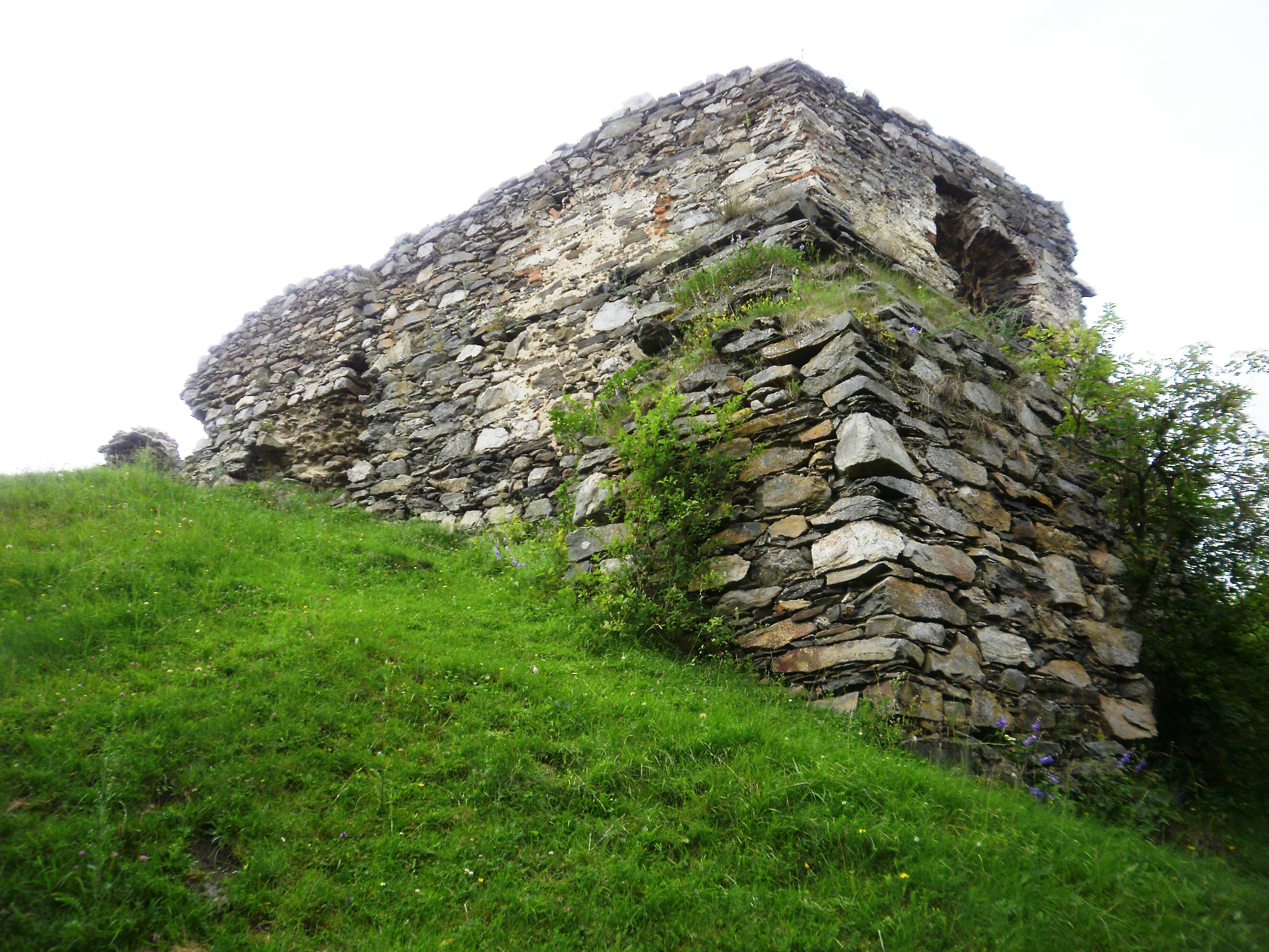 Руїни замку (мур.), с.Губкiв